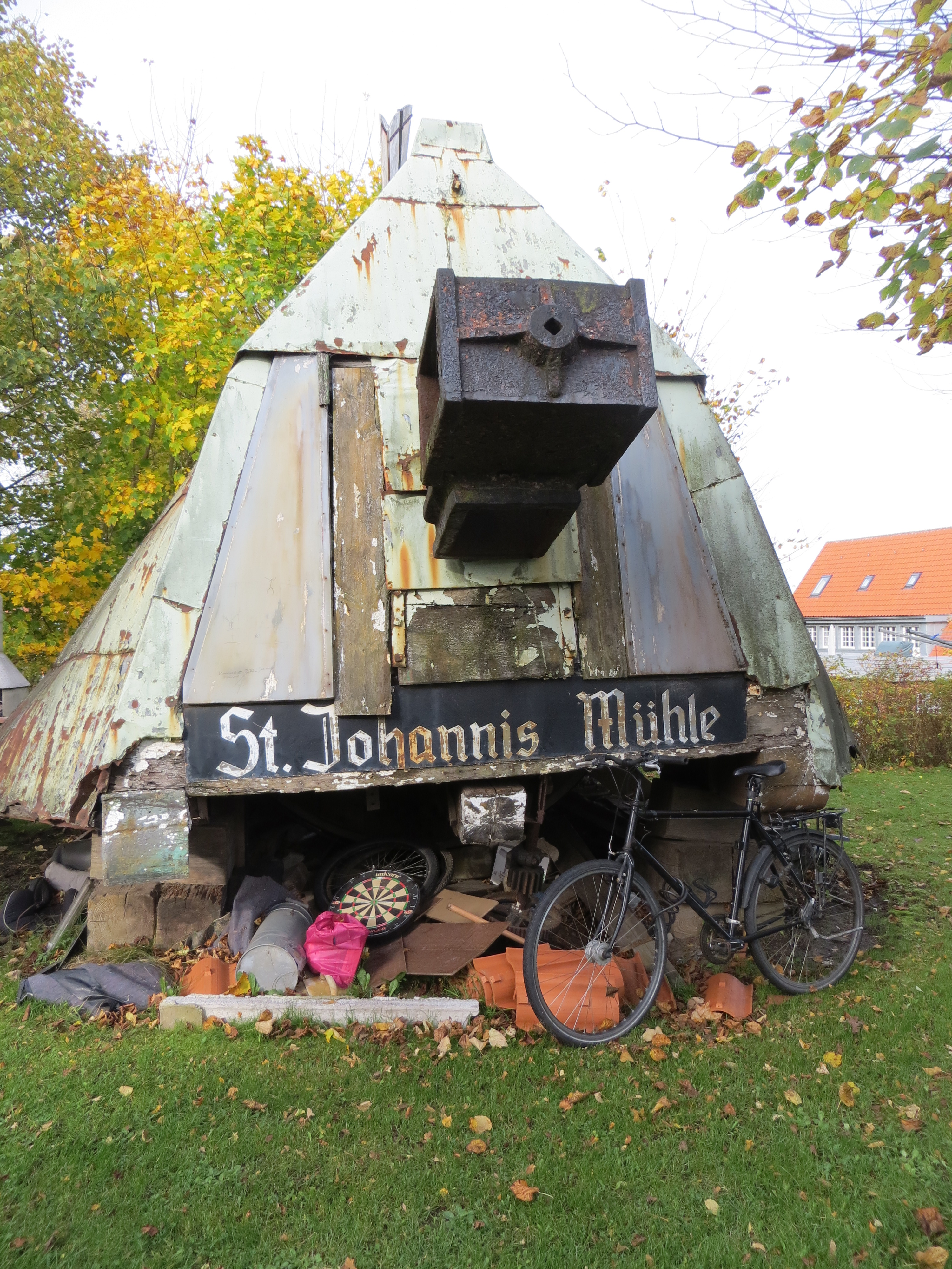 Das Dach der St. Johannis Mühle am Boden (Flensburg im Oktober 2013), Bild 02